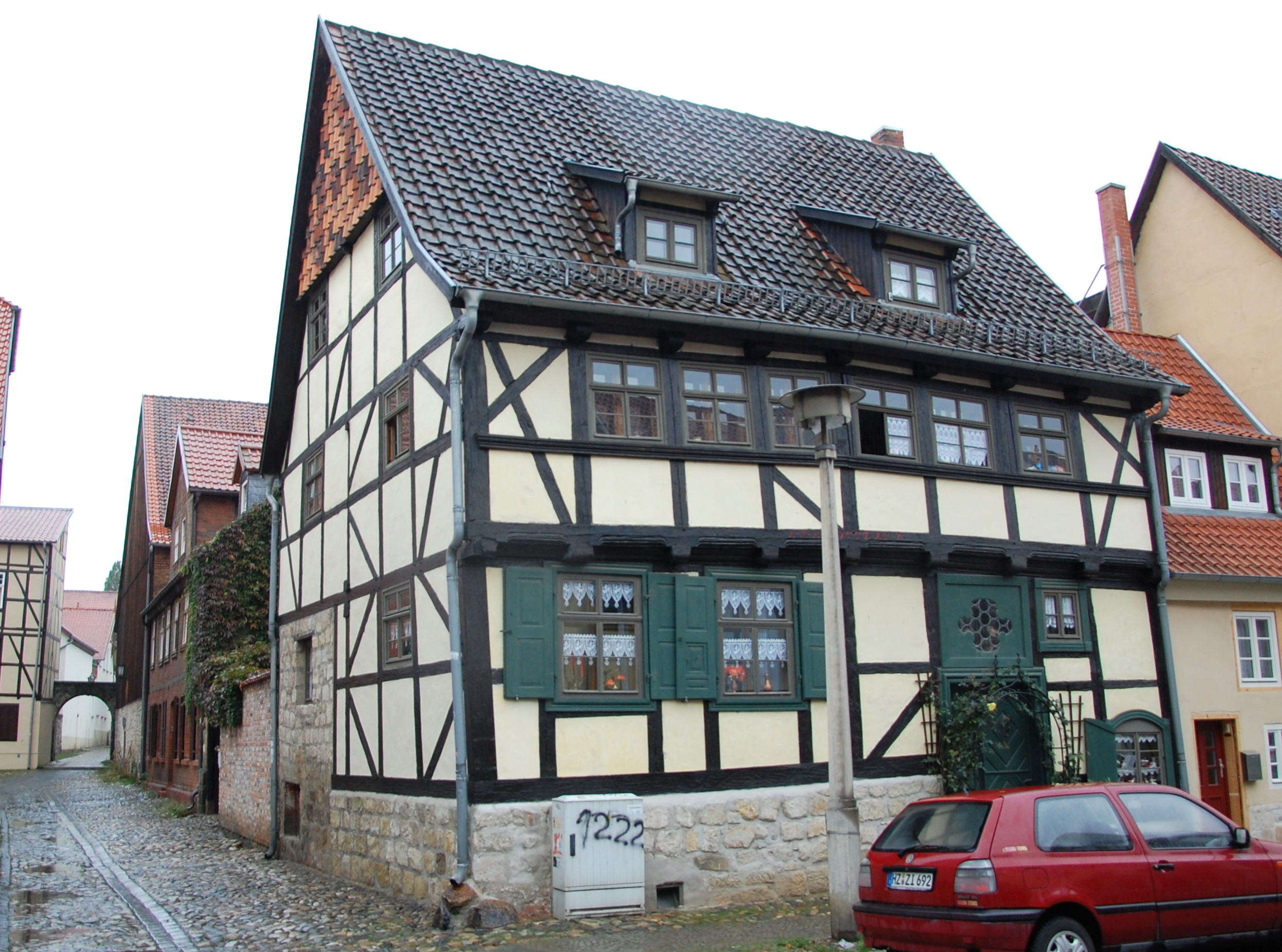 Haus Kaiserstraße 34 in Quedlinburg